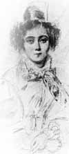 Celina Szymanowska